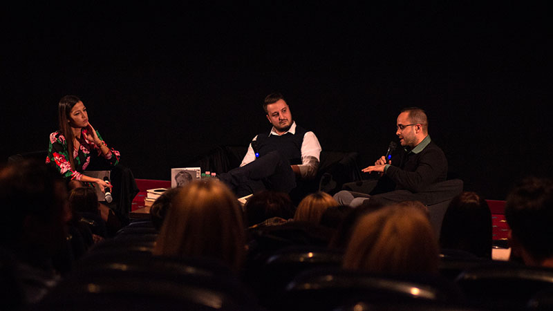 Előadás Ernest Hemingway életéről Szabados Ágnessel